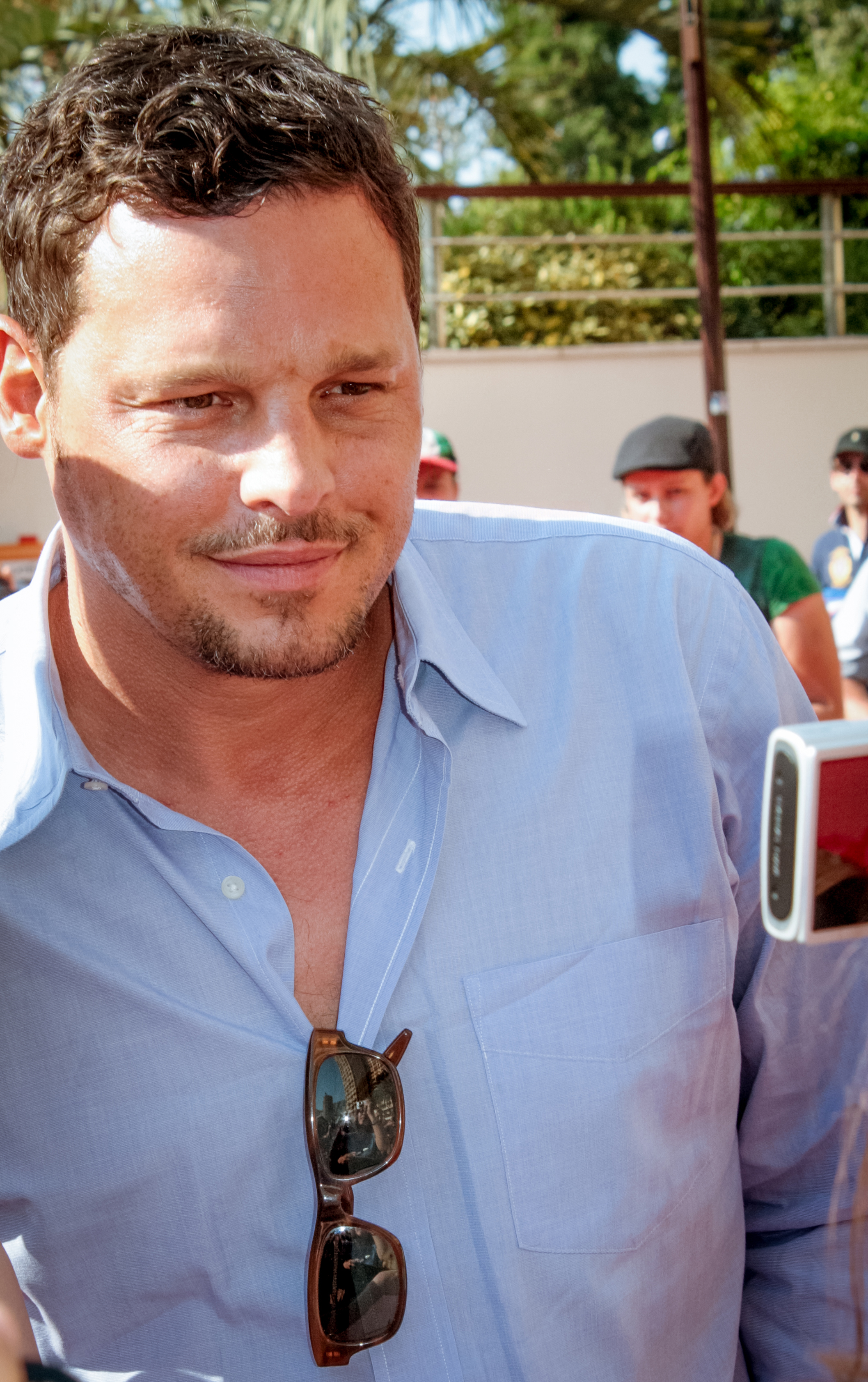 Justin Cambers au festival de Monte Carlo 2014